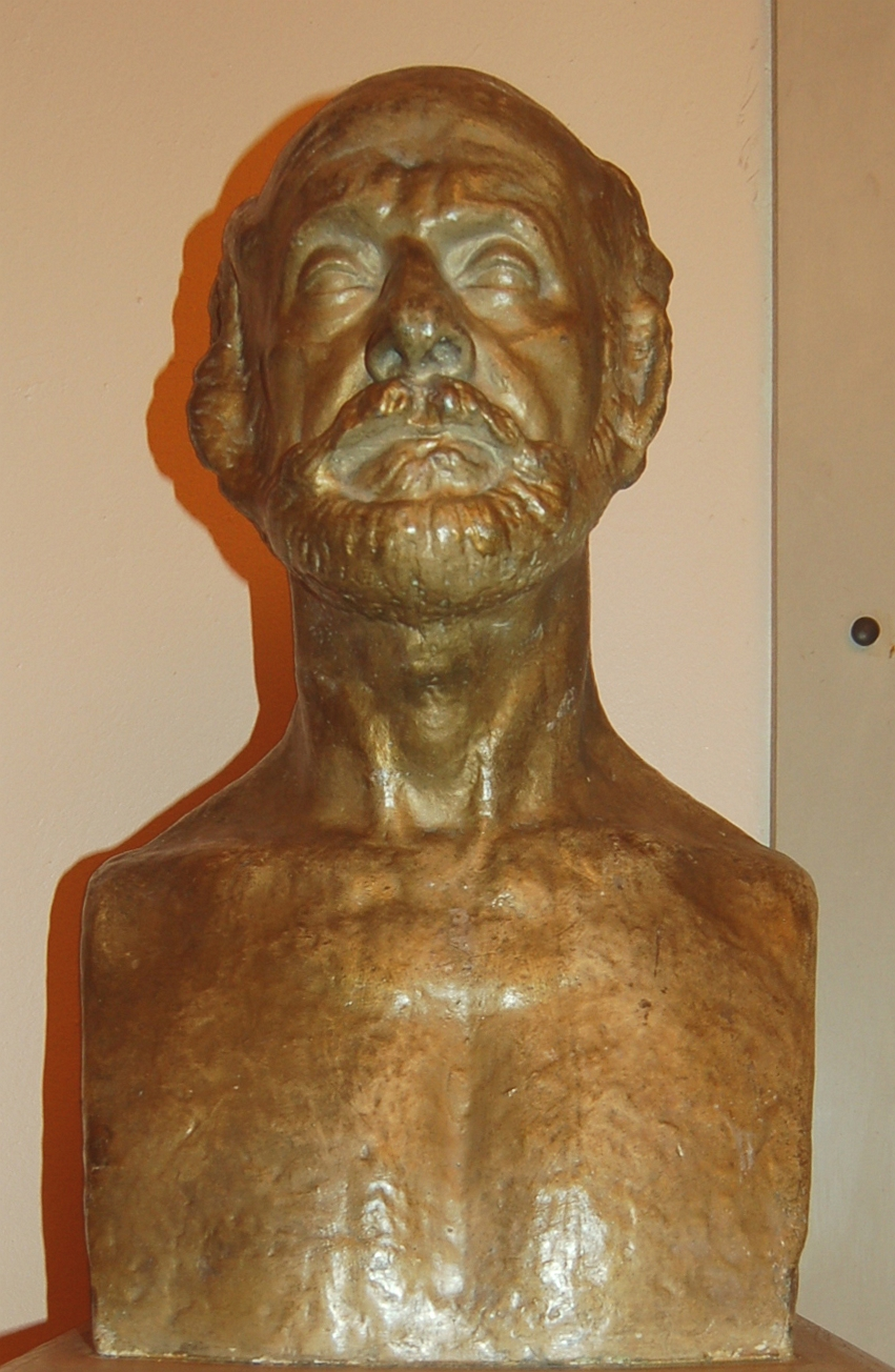 Buste d'Auguste Perret exposé dans la Salle Cortot à Paris (Buste fait par Antoine Bourdelle, (October 30, 1861 - October 1, 1929))